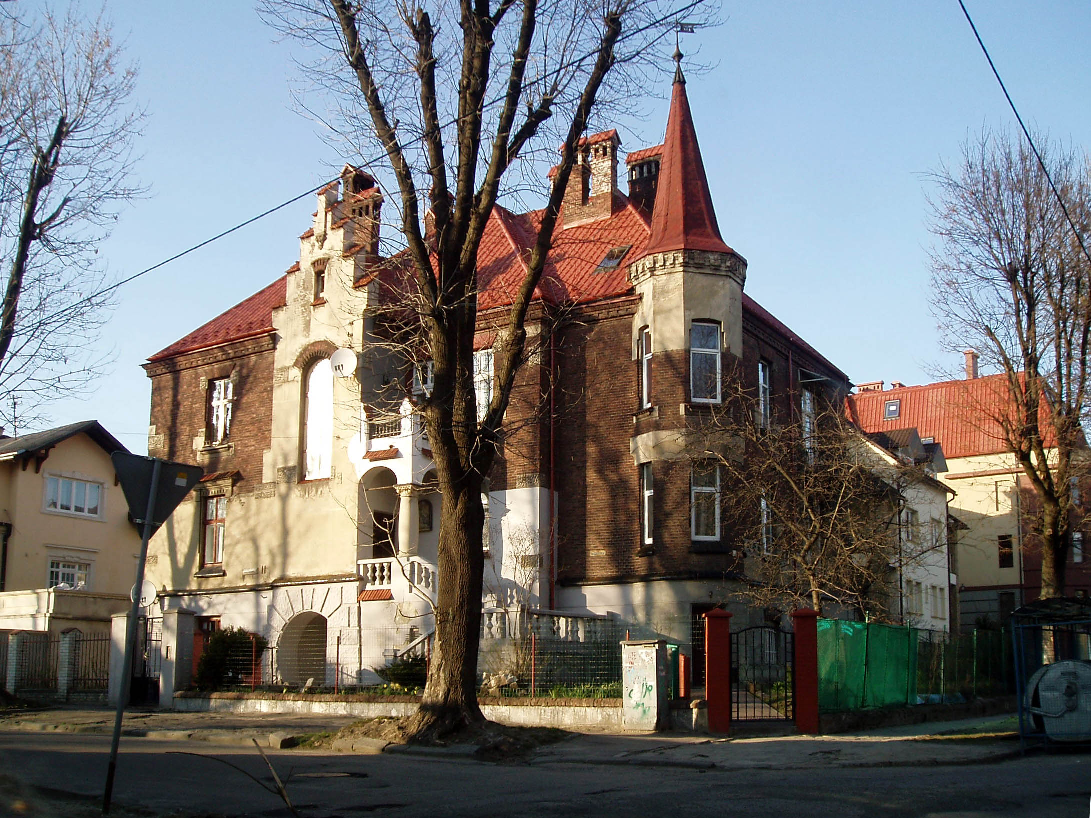 Будинок № 11 на вулиці Ожешко у Львові. Збудований 1907 року за проектом Людвіка Вельтце (1871-?).